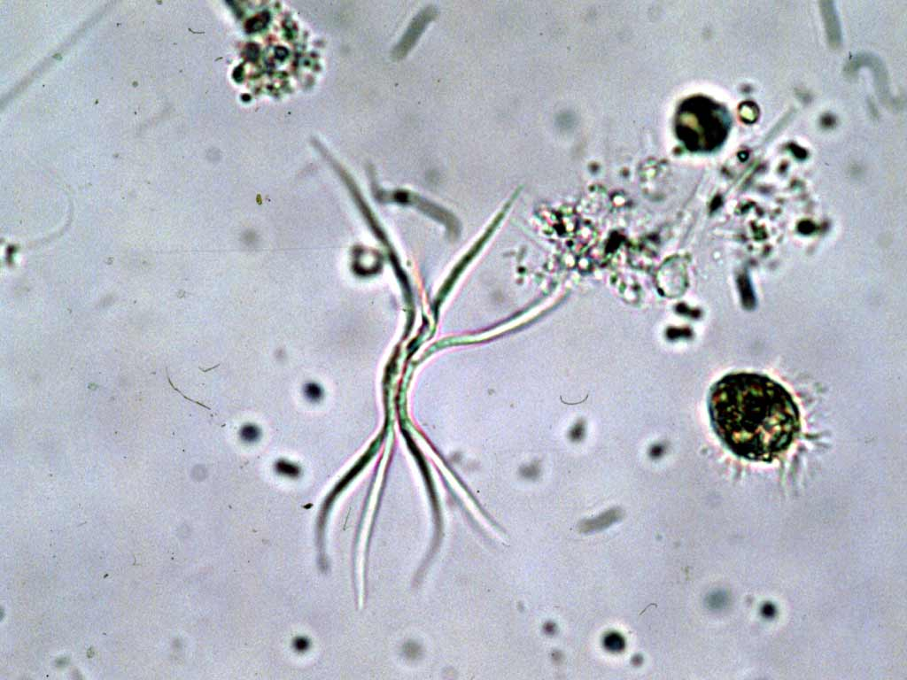 Ankistrodesmus falcatus